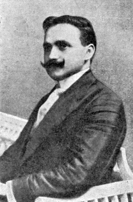 Constantin Râuleț